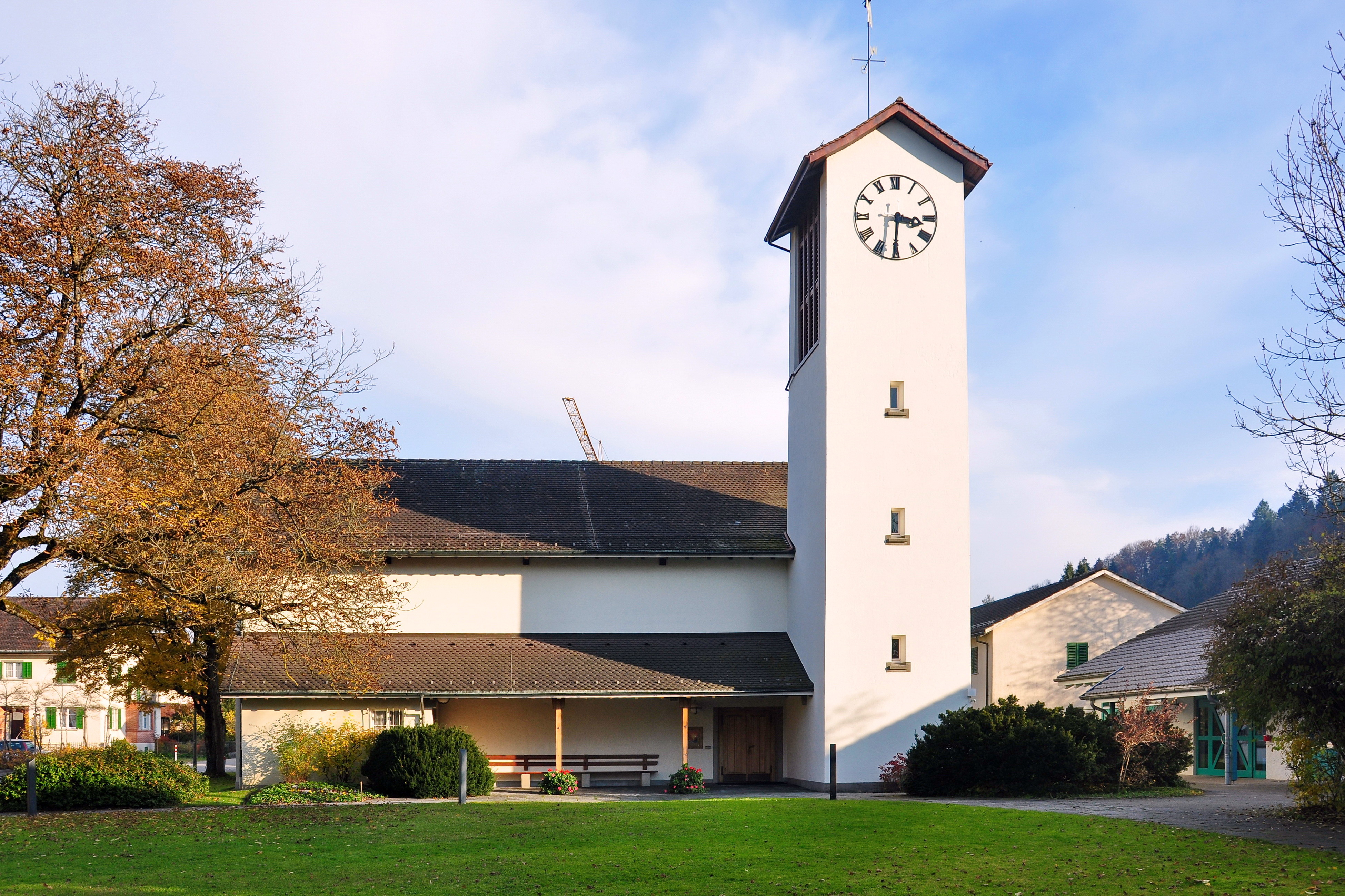 Kollbrunn (Switzerland)